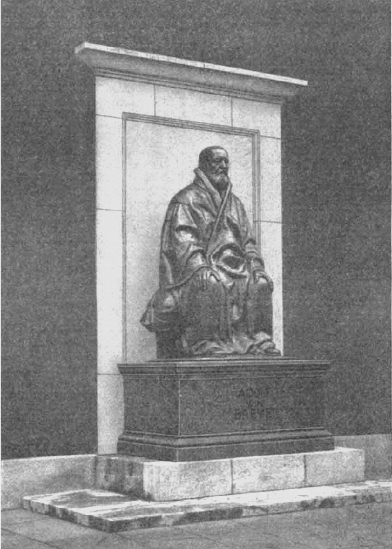 LMU München - Adolf von Baeyer – Denkmal vor dem Willstätter-Erweiterungsbau in der Arcisstr.1; heute in der LMU München-Großhadern.